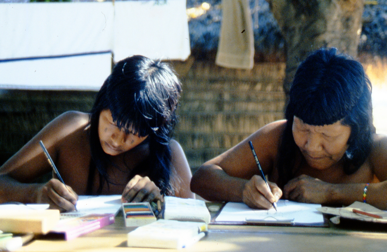 Edukation